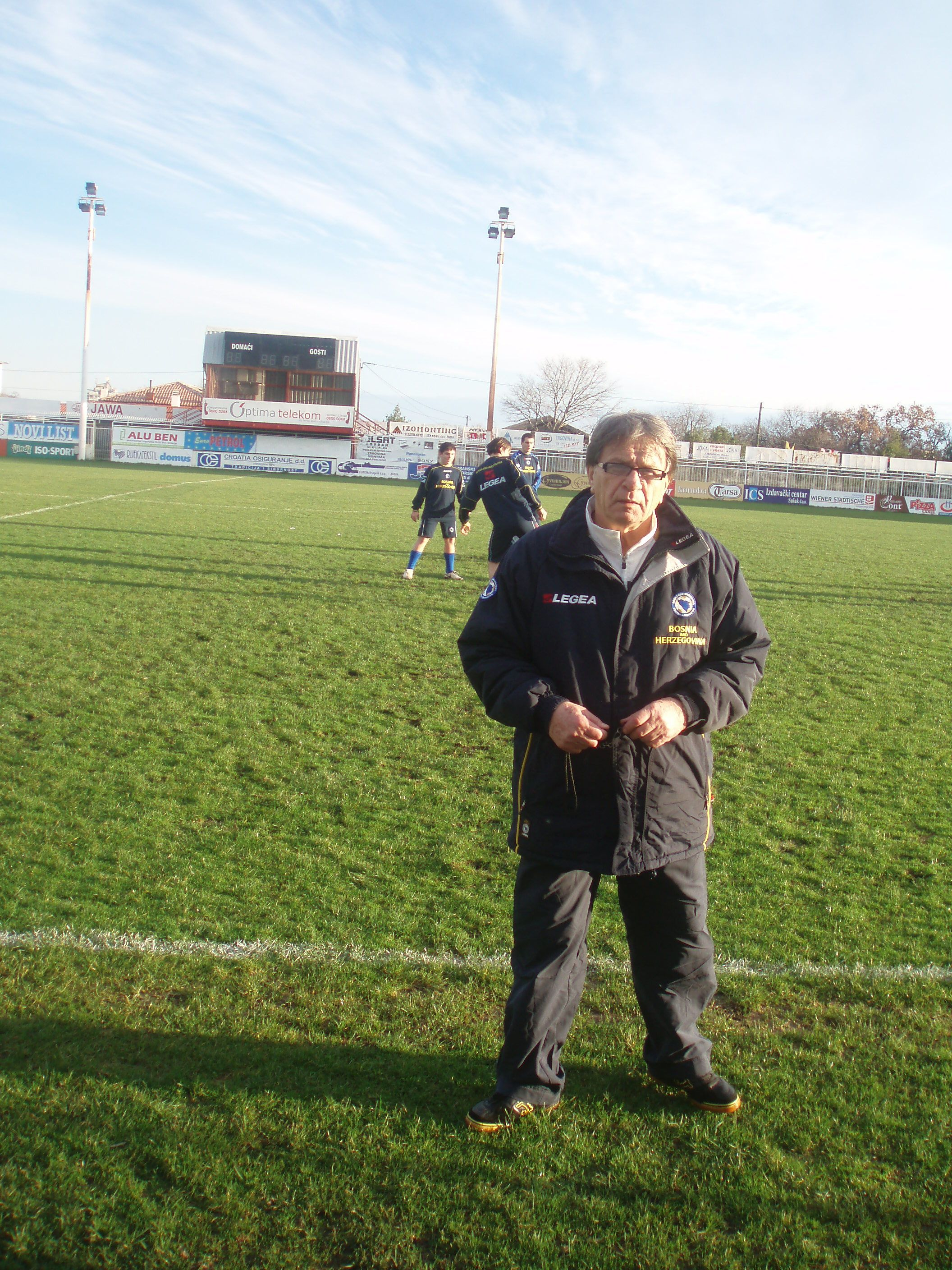 Ćiro Blažević na Orijentovom igralištu u Rijeci